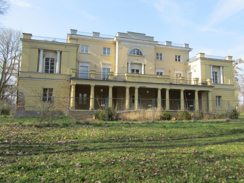 Zdjęcie pałacu w Jankowicach